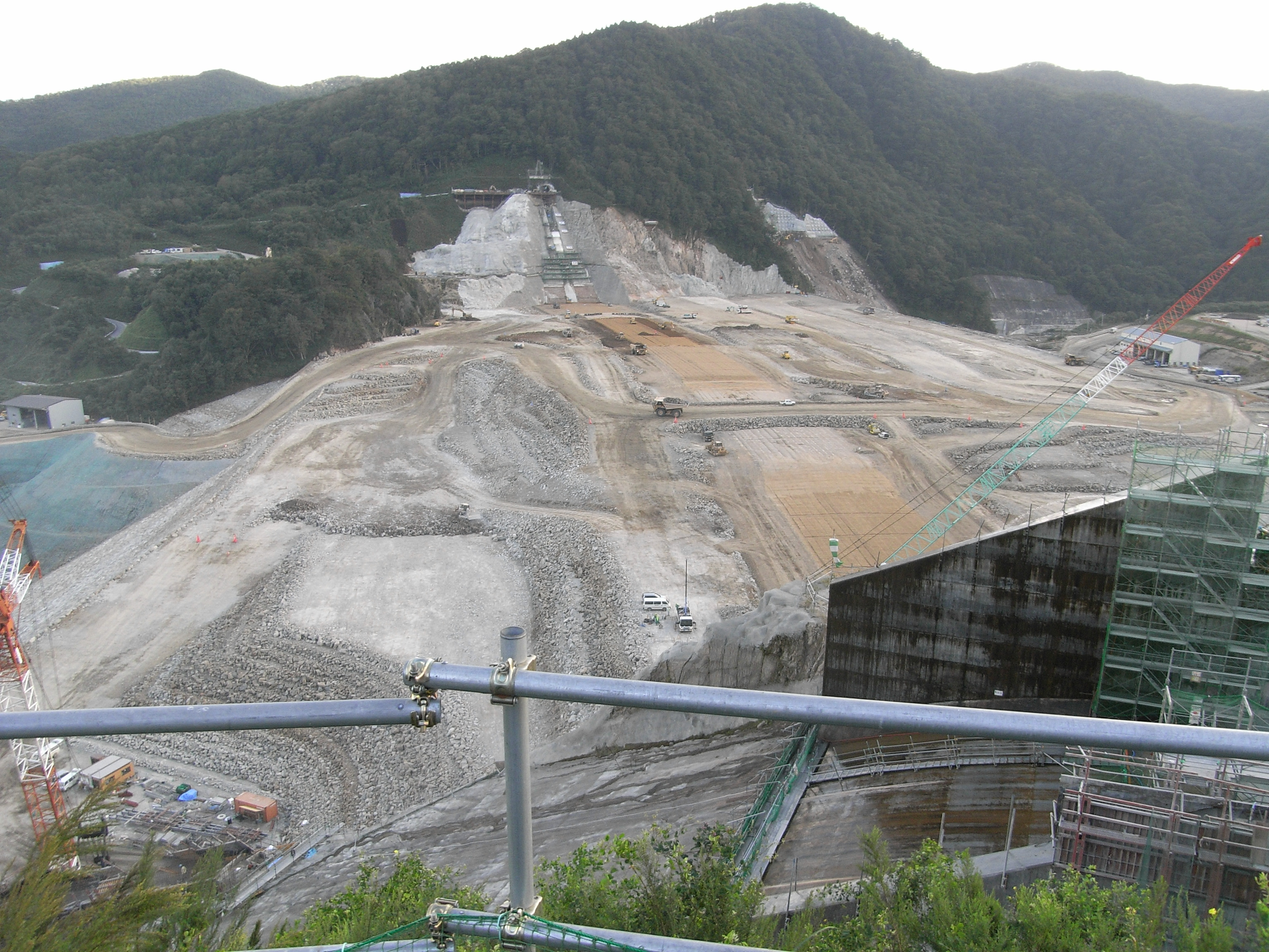 Dam